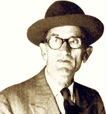 Enrico Borrello